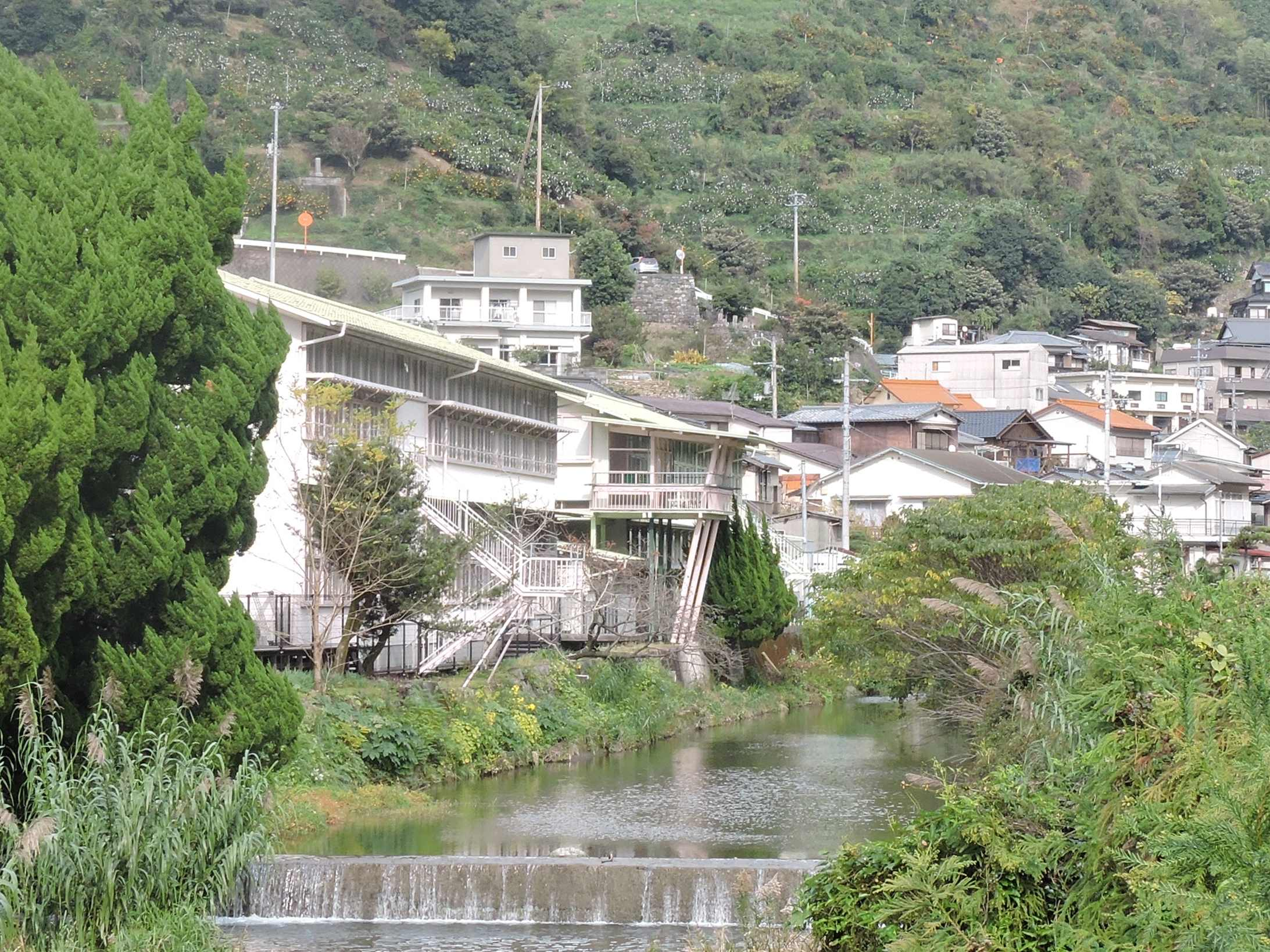 建築家 松村正恒が八幡浜市建築課に勤務していた時に設計した近代木造建築物。モダニズム建築を木構造により実現した極めて稀なもの。2012年に国の重要文化財に指定されました。